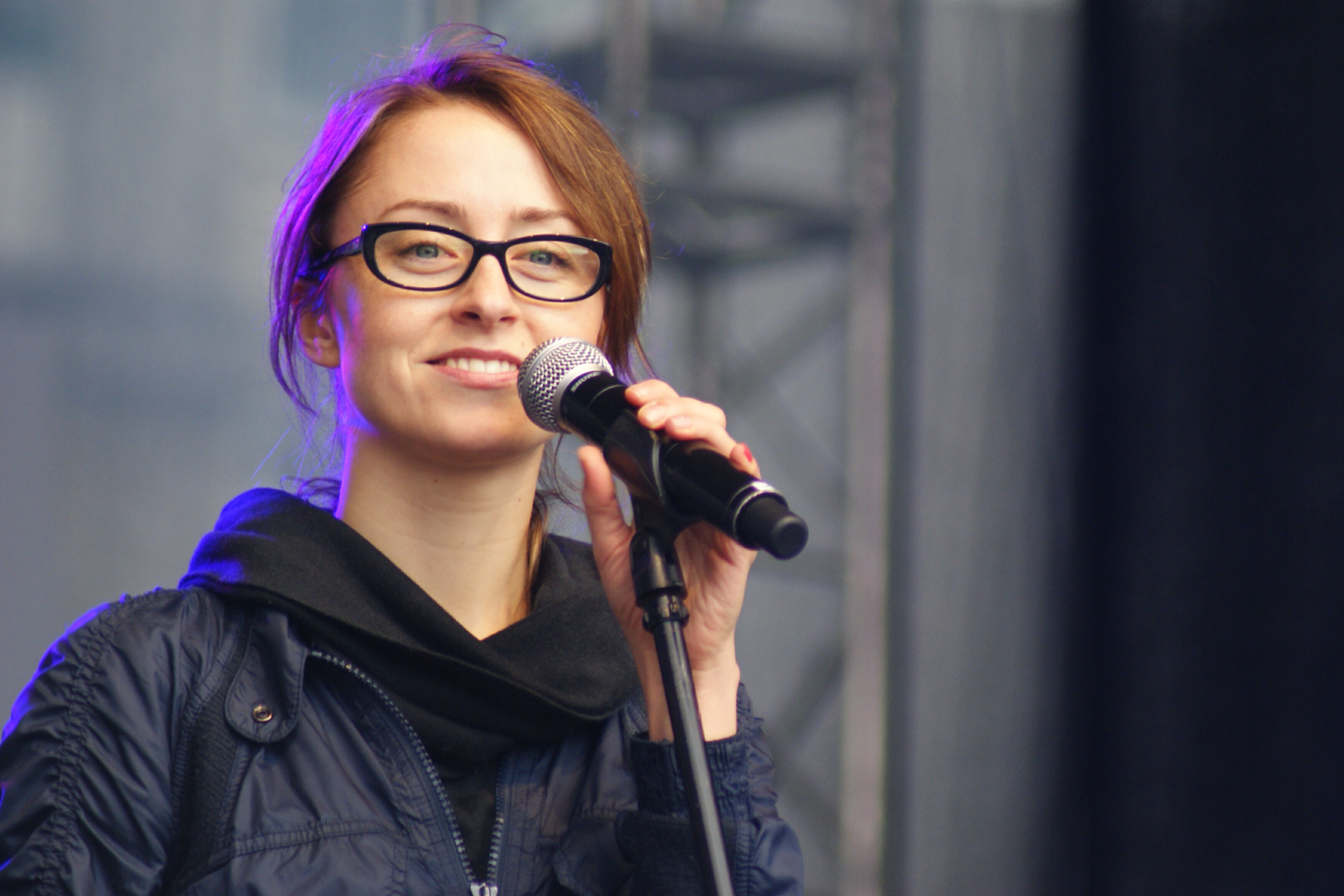 Natalia Przybysz